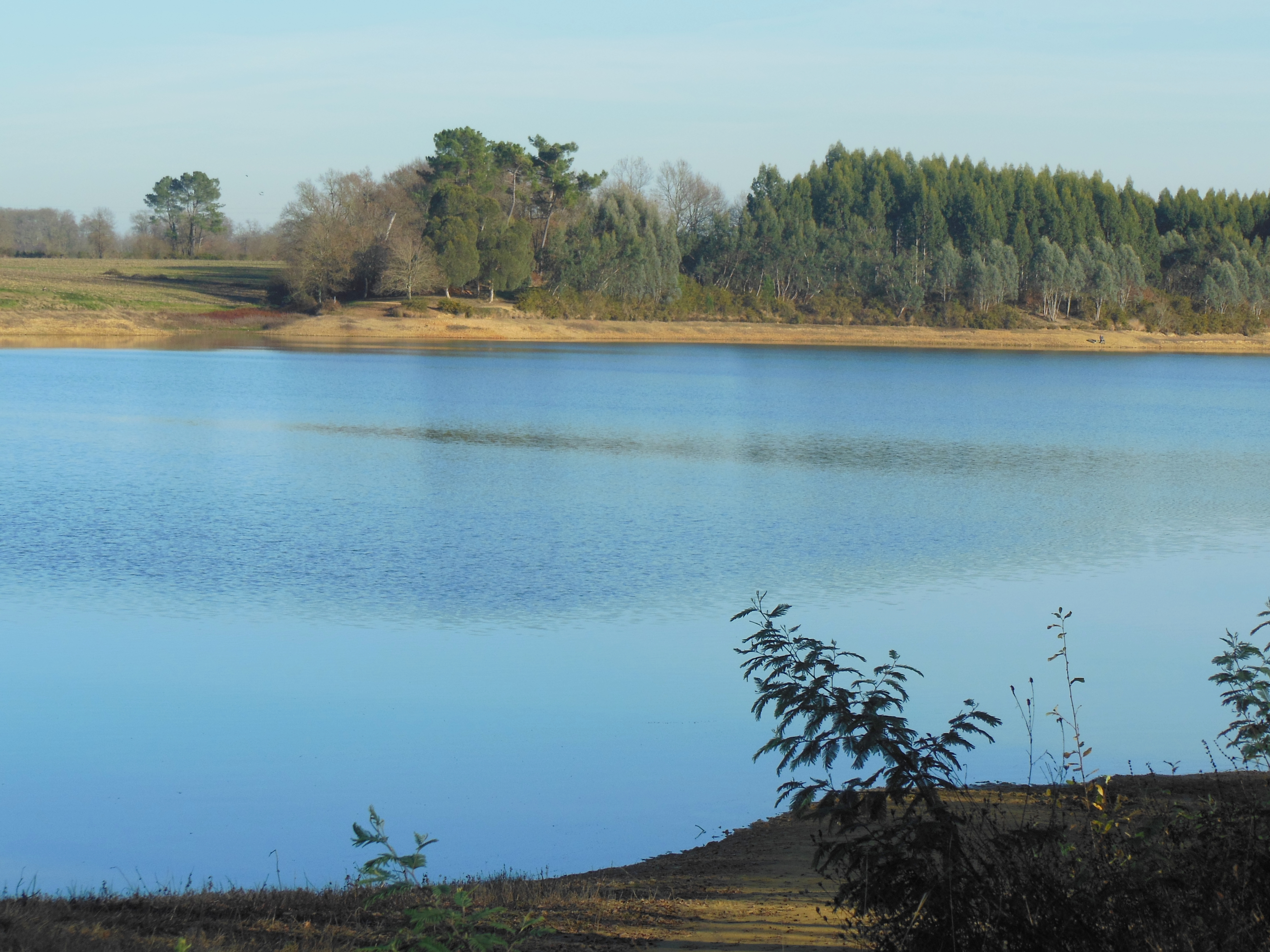 Lac d'Agès vu d'Hagetmau, dans le département français des Landes.